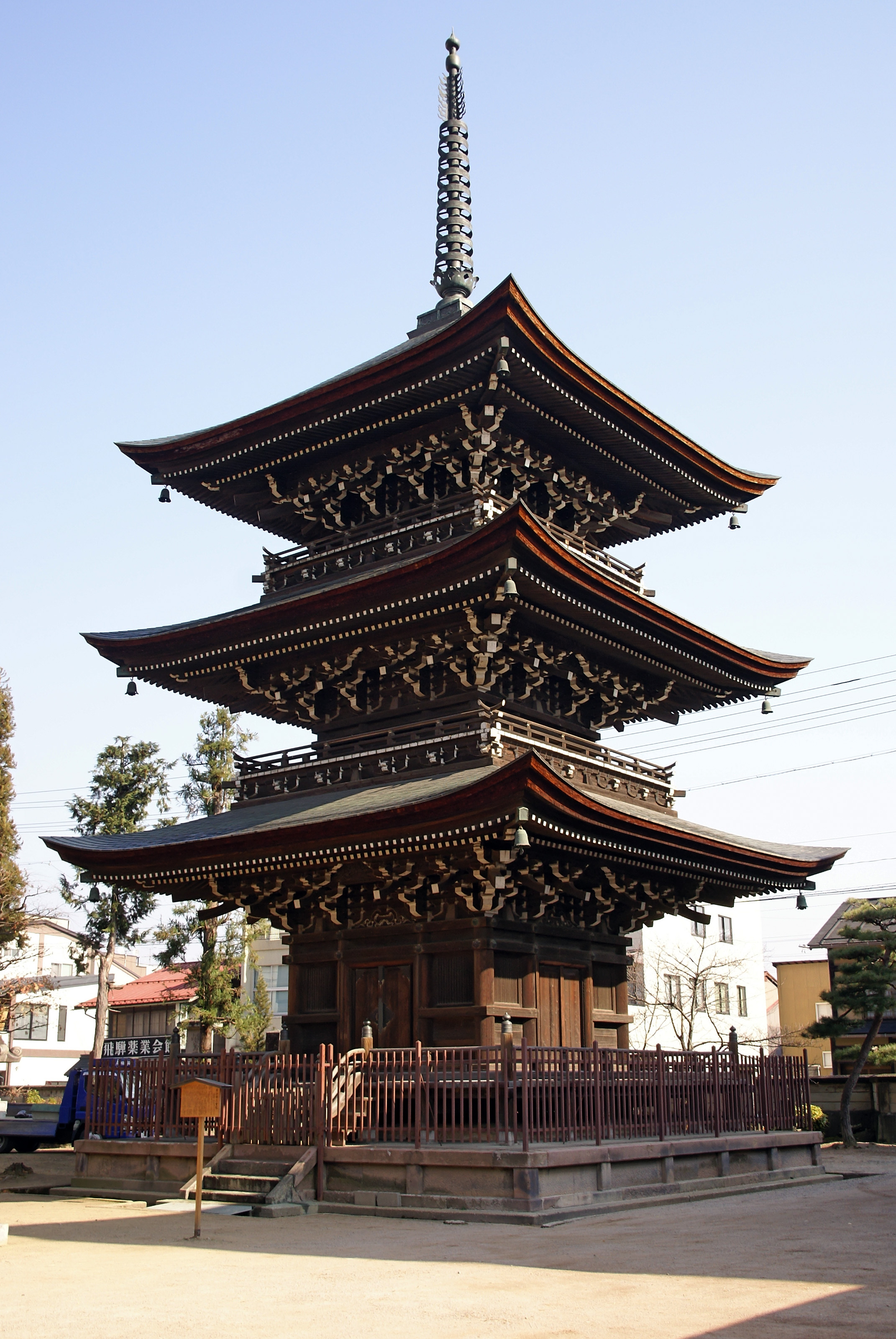 Hida-kokubunji in Takayama, Gifu prefecture, Japan